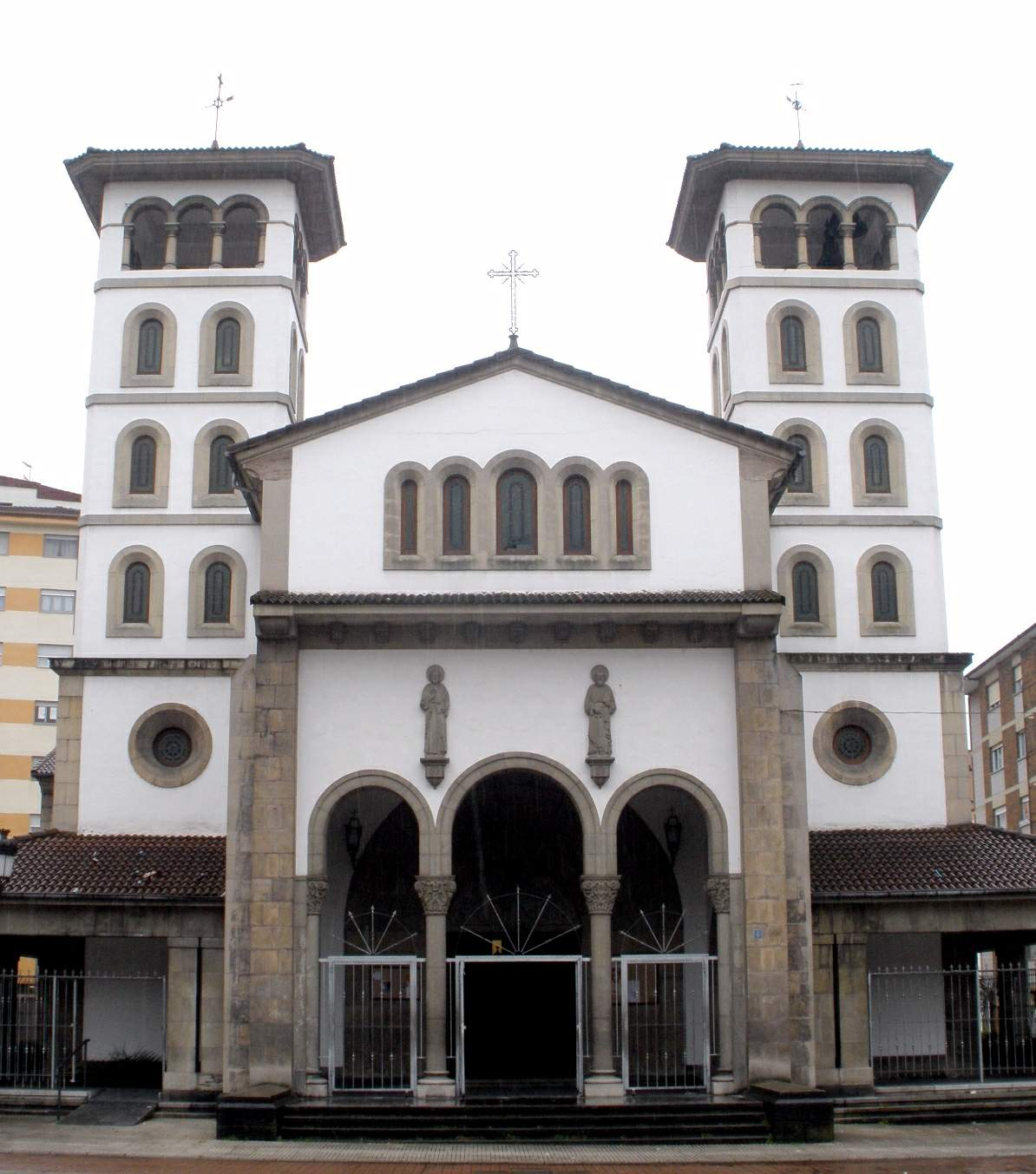 El Entrego (San Martín del Rey Aurelio) - Iglesia de San Andres